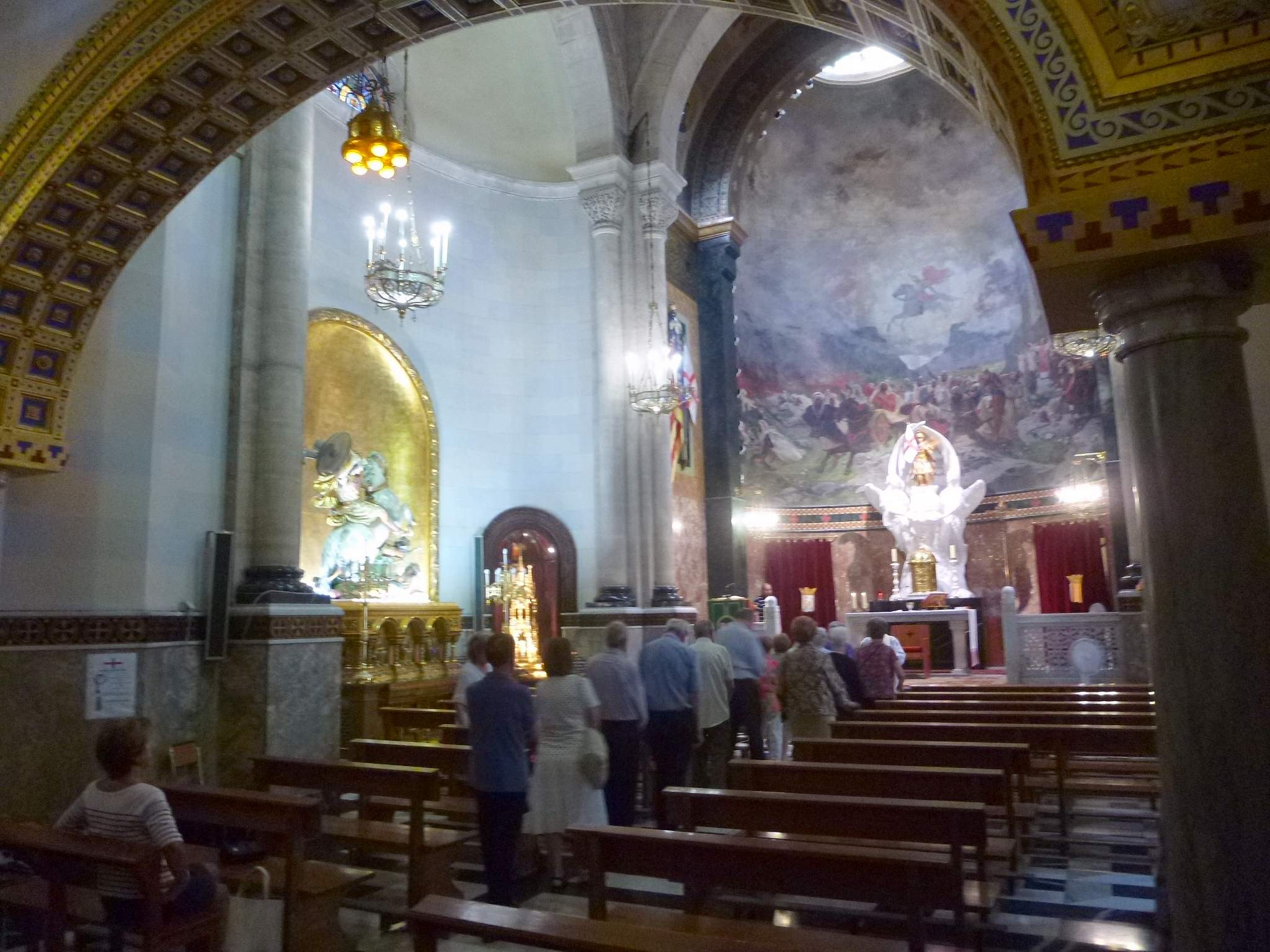 Iglesia de Sant Jordi (Alcoy, Alicante)